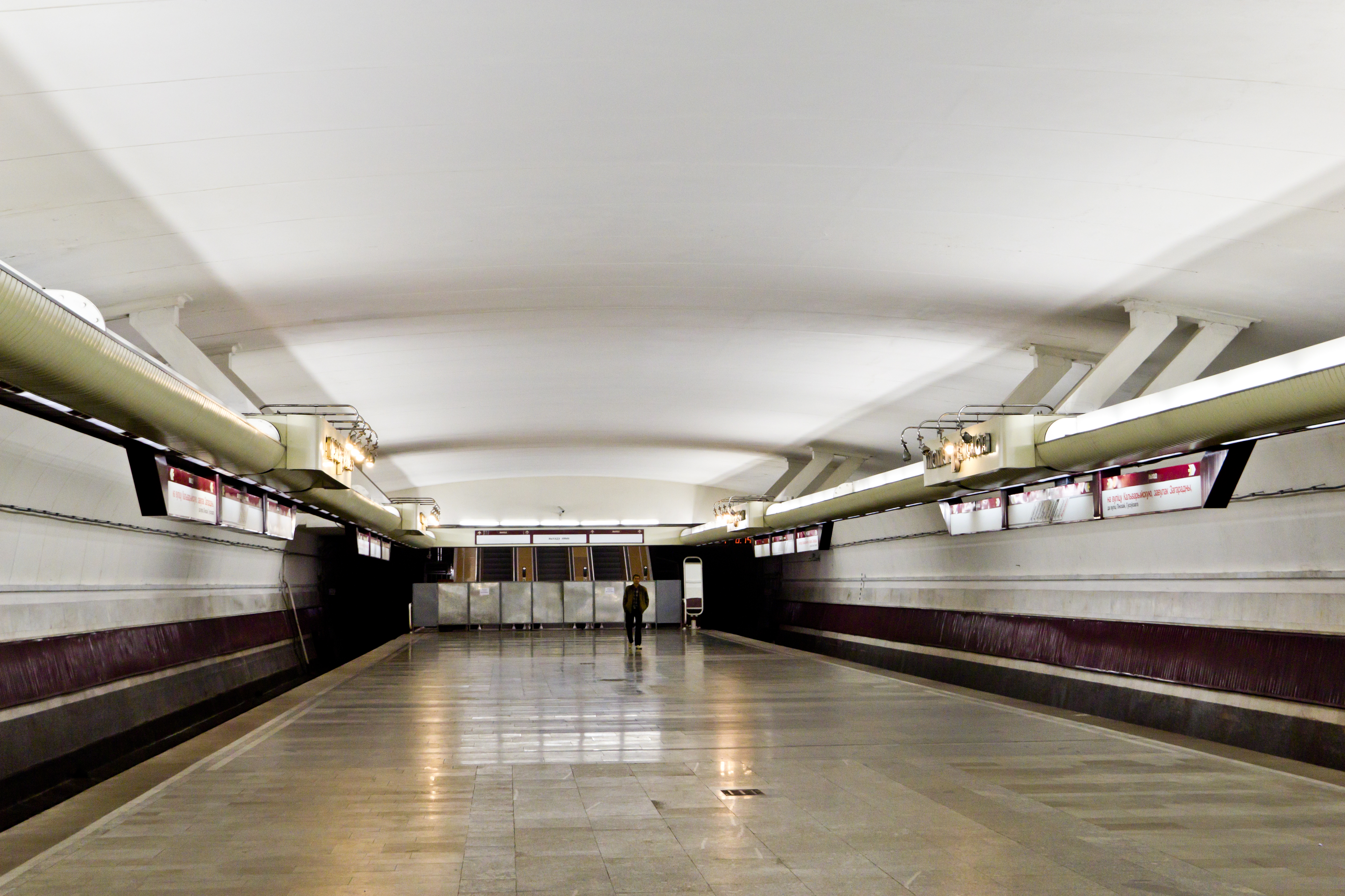 Станция метро «Молодёжная», Минск